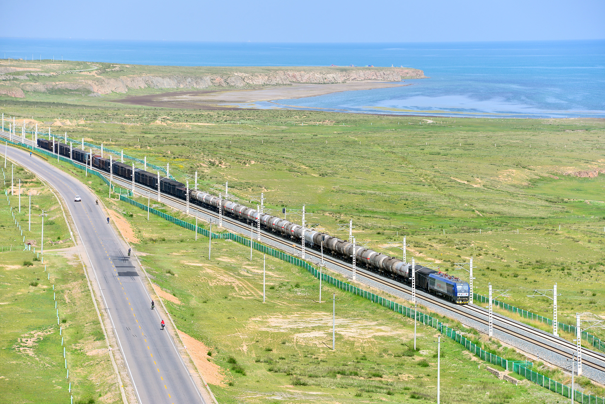 photo by Xundaogong 巡道工出品 鸟岛信号塔